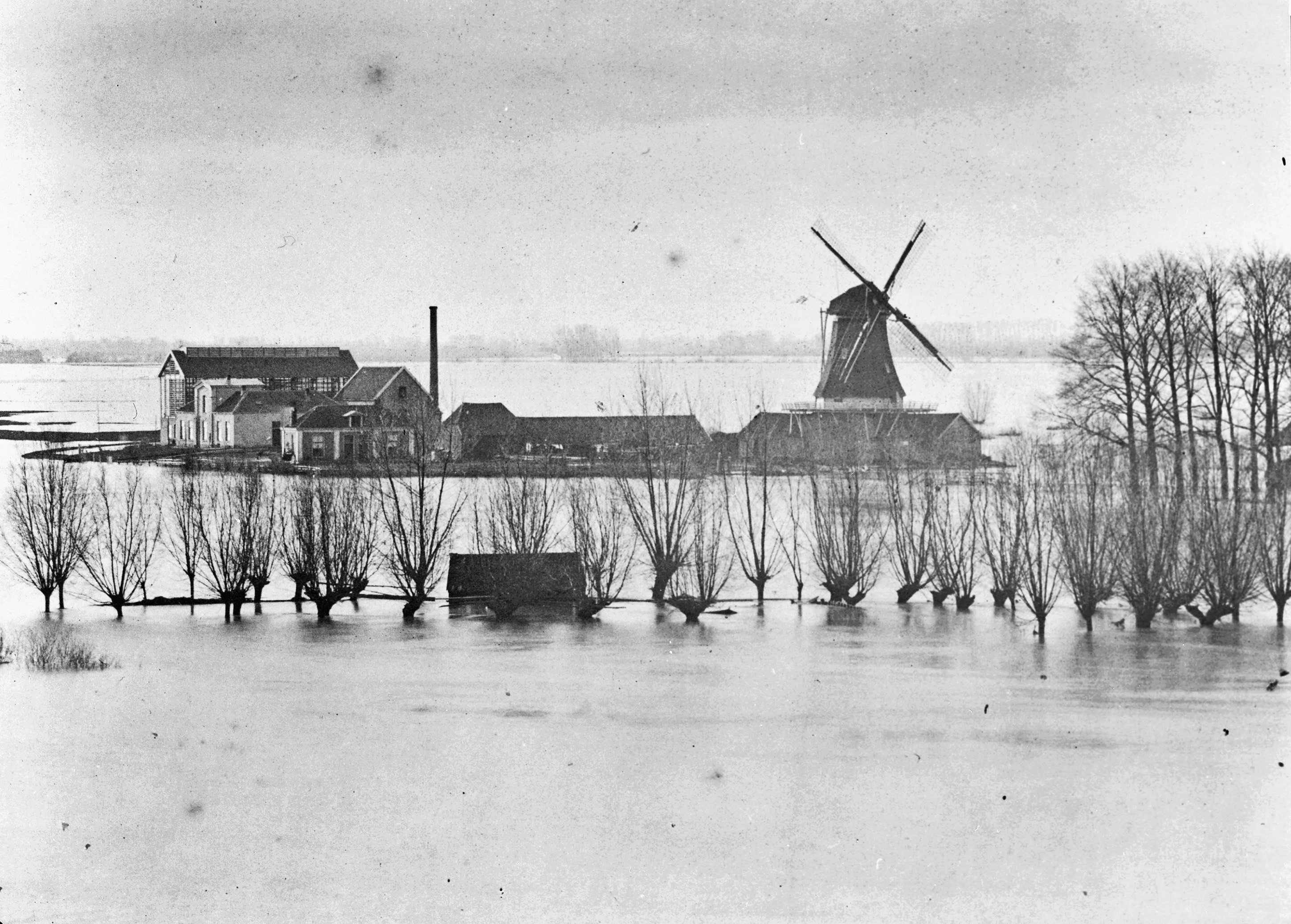 Bolwerksmolen: Houtzaagmolen van voren gefotografeerd temidden van ondergelopen uiterwaarden